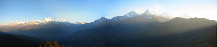 זריחה למרגלות רכס האנפורנה. תצפית מה-poon hill.